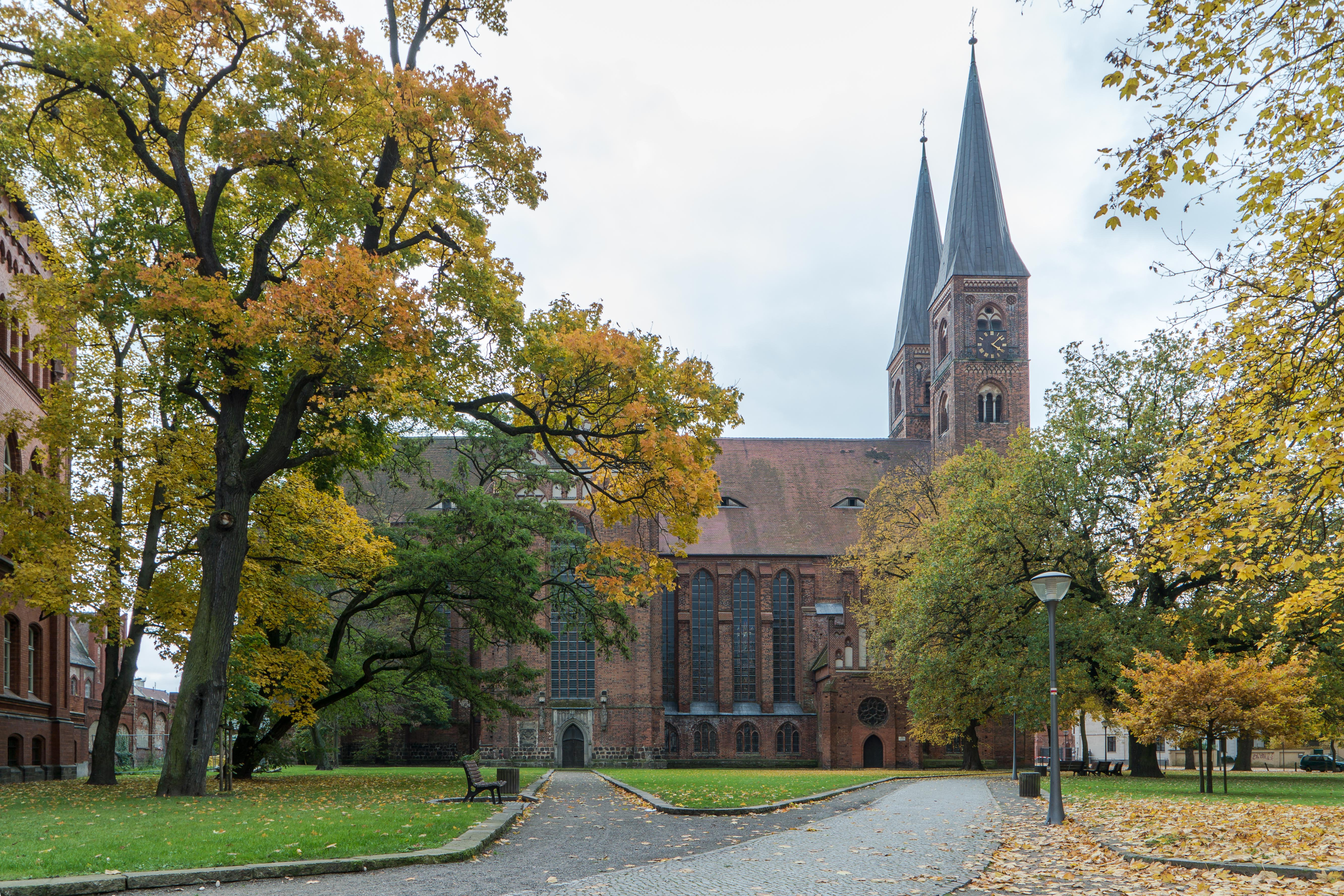 Dom St. Nikolaus Stendal. Ansicht Nordseite